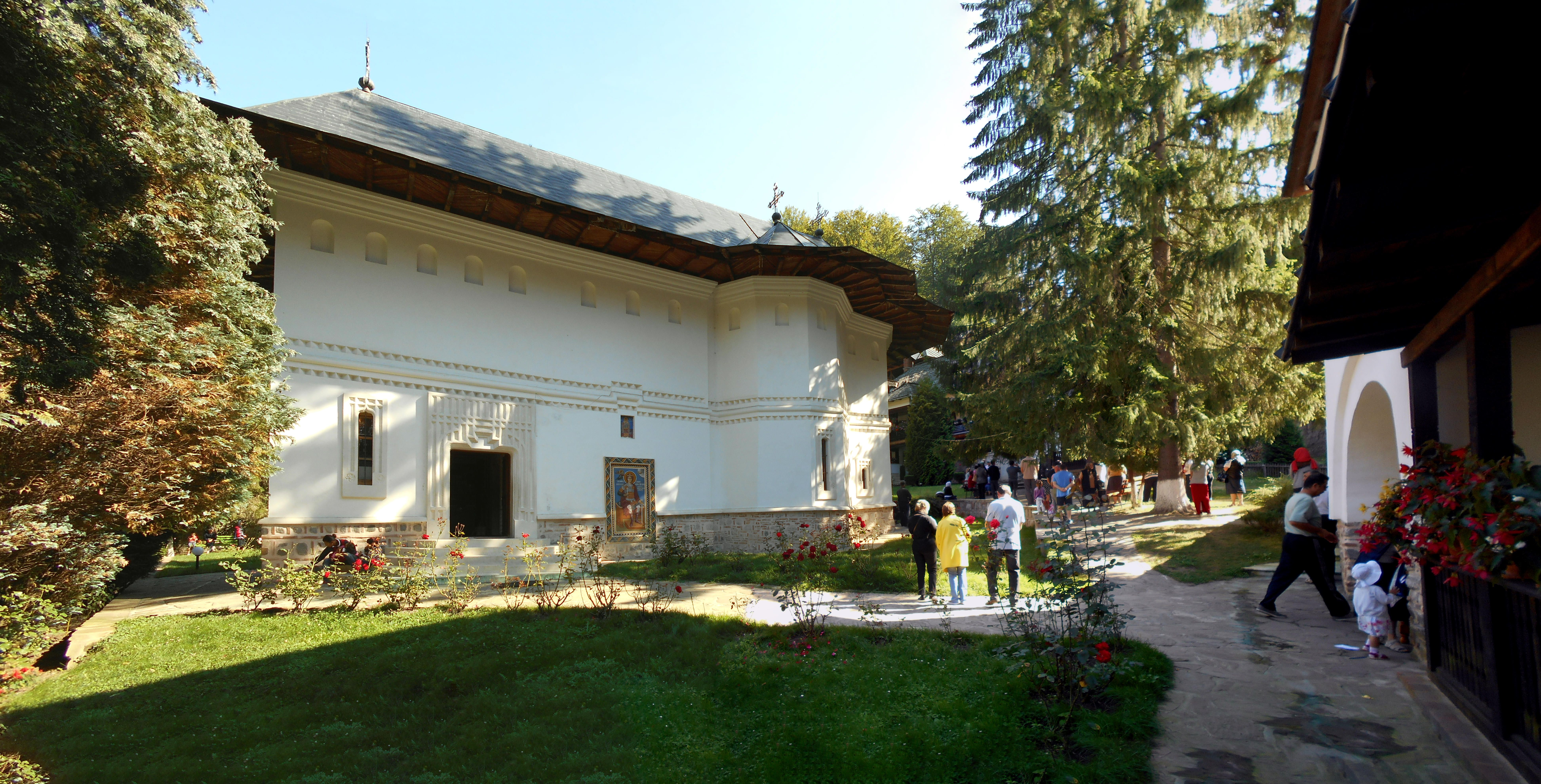 Manastirea Robaia - biserica 01